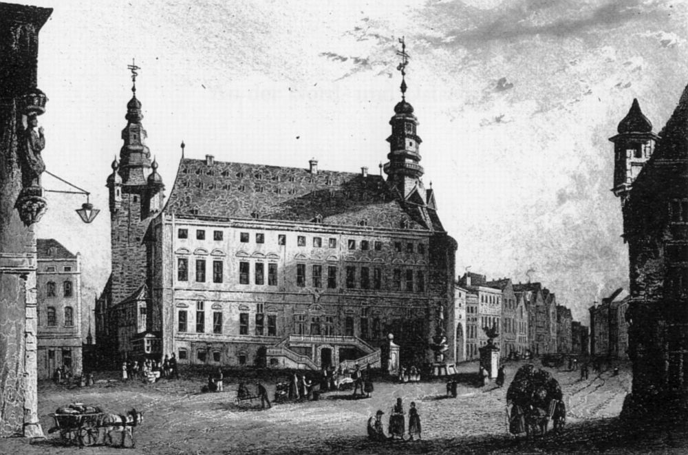 Aachen, Marktplatz (mit Rathaus). Stahlstich, ca. 10 × 15 cm.